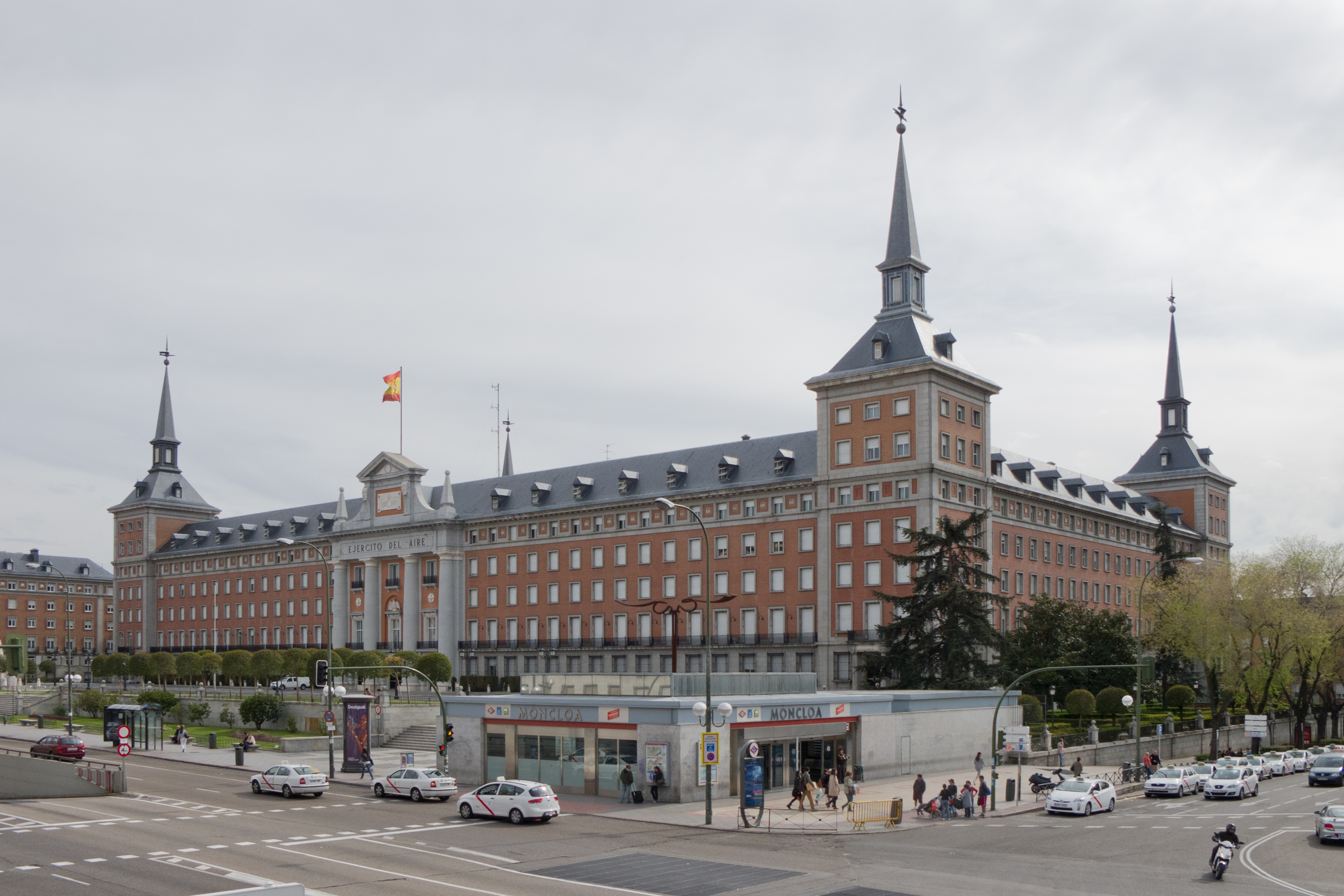 Cuartel General del Ejército del Aire de España, Madrid, España.